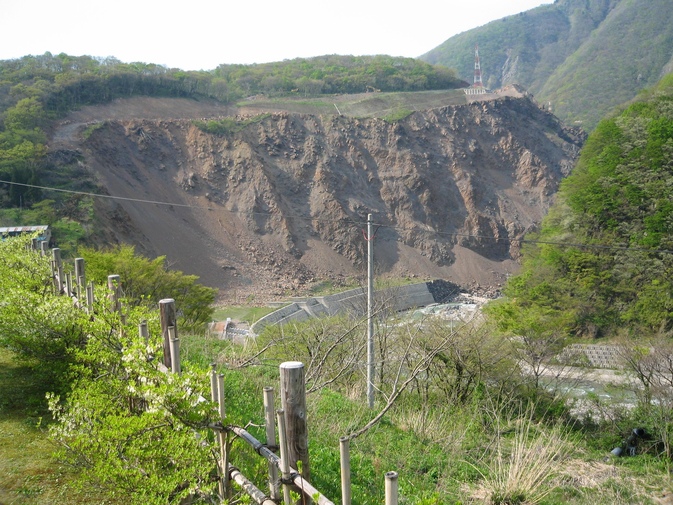 新潟県糸魚川市の蒲原温泉付近